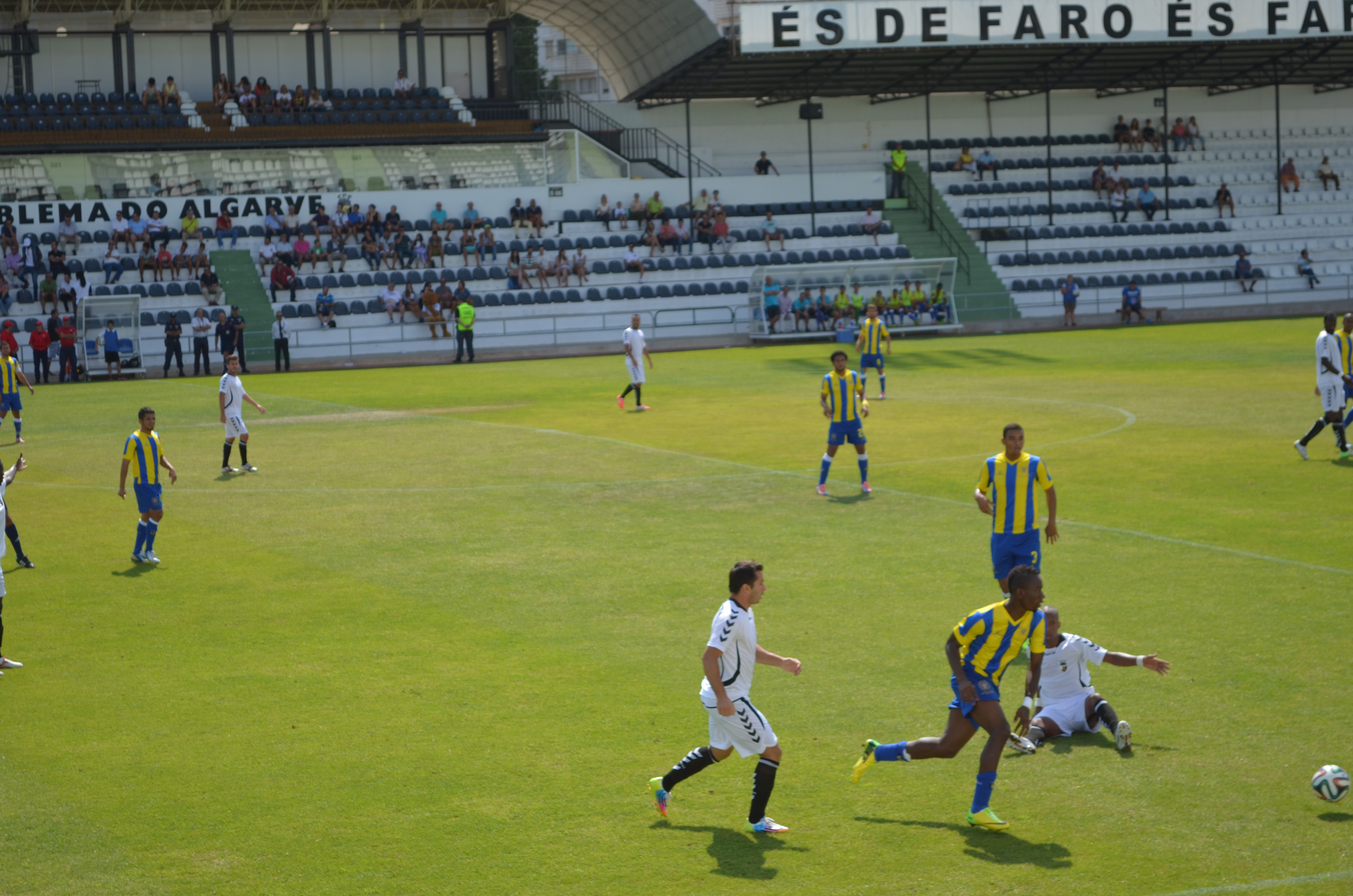 Taça da ligua portuguesa 2014 - SC Farense vs Uniao Madeira - 2014-08-03 (0-1). Estadio Sao Luis de Faro.